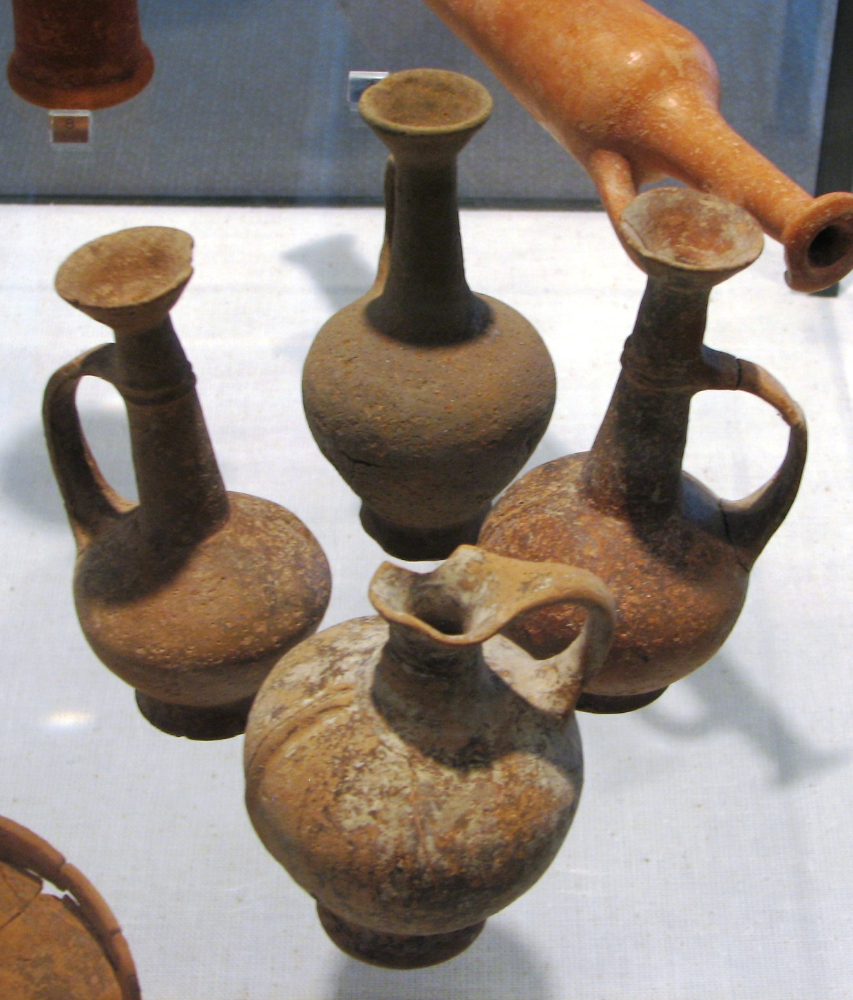 Late Bronze Period Pottery in Hecht Museum - Base Ring Ware כלים מתקופת הברונזה המאוחרת במוזיאון הכט באוניברסיטת חיפה פכיות "בילביל" קטנות מחופות שחור מעוטרות בפסים לבנים ממשפחת כלי בסיס טבעת יבוא קיפרי